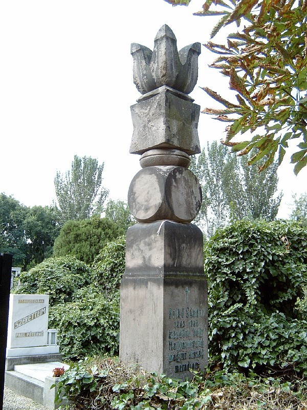 Kezdőlap Pethő Sándor (Pásztori, 1885. márc. 1. – Balatonfüred, 1940. aug. 25.): publicista, történész sírja Budapesten. Kerepesi temető: 34-1-59.